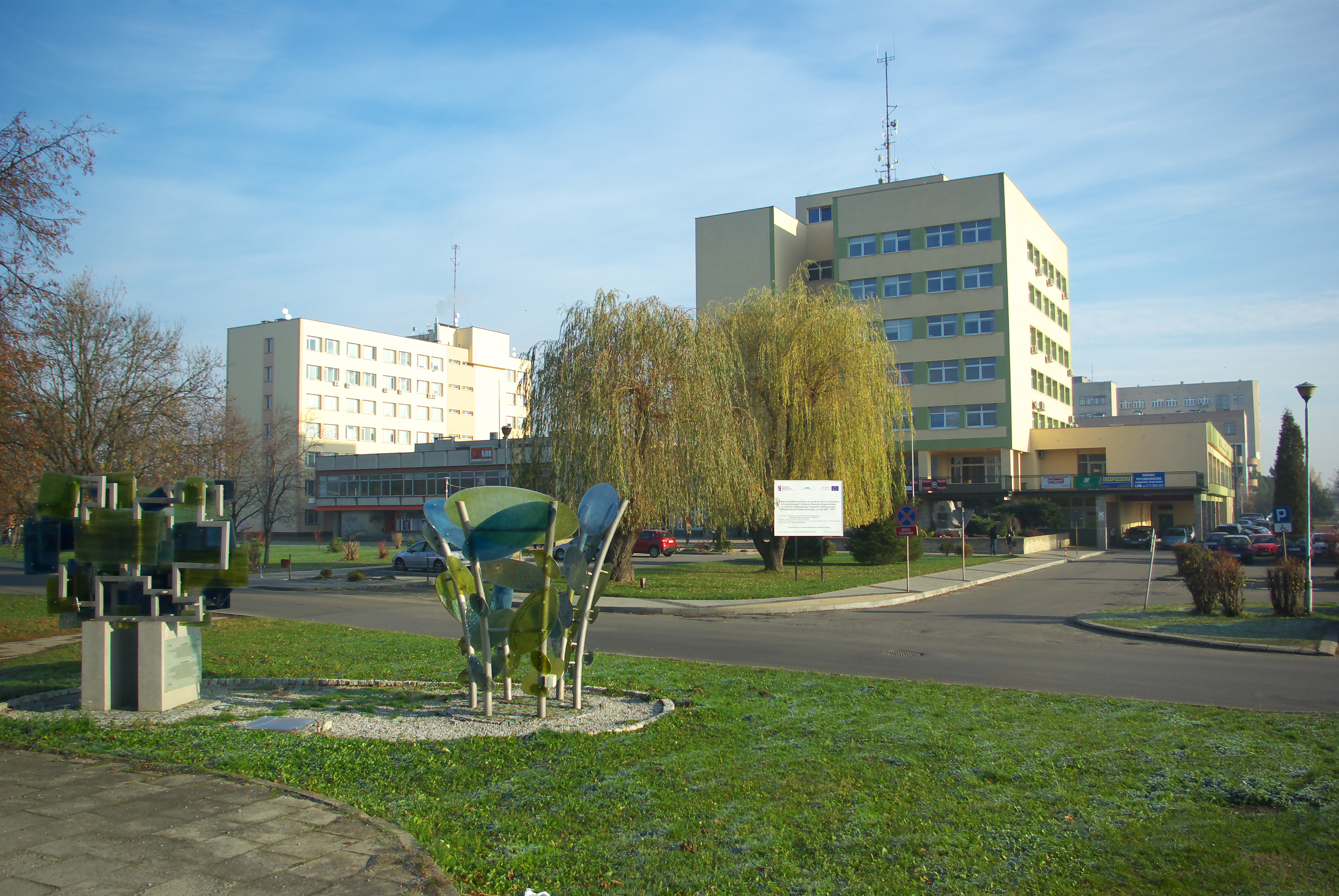 Ulica Bieszczadzka 1 w Krośnie. Siedziba starostwa powiatowego w Krośnie